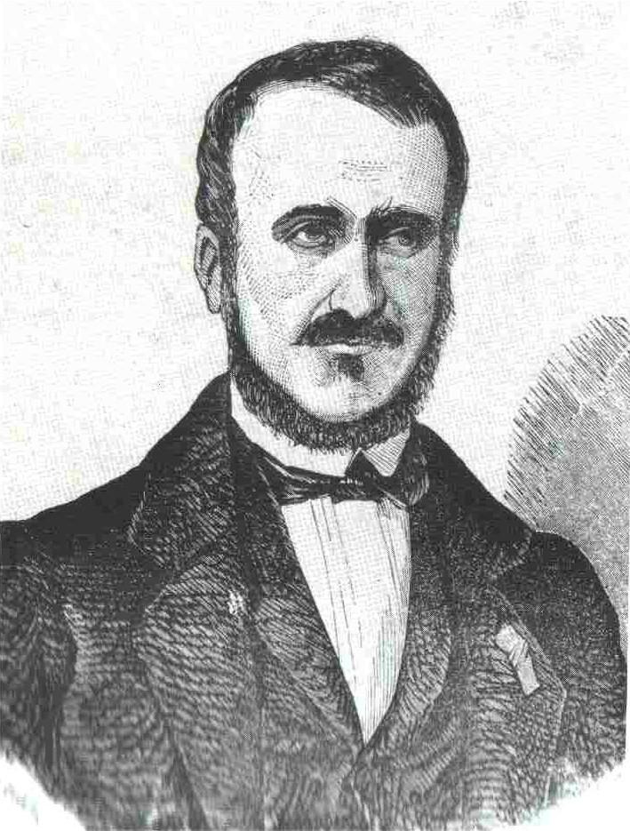 Ritratto del conte Filippo Linati (Barcellona 1816-Parma 1895).